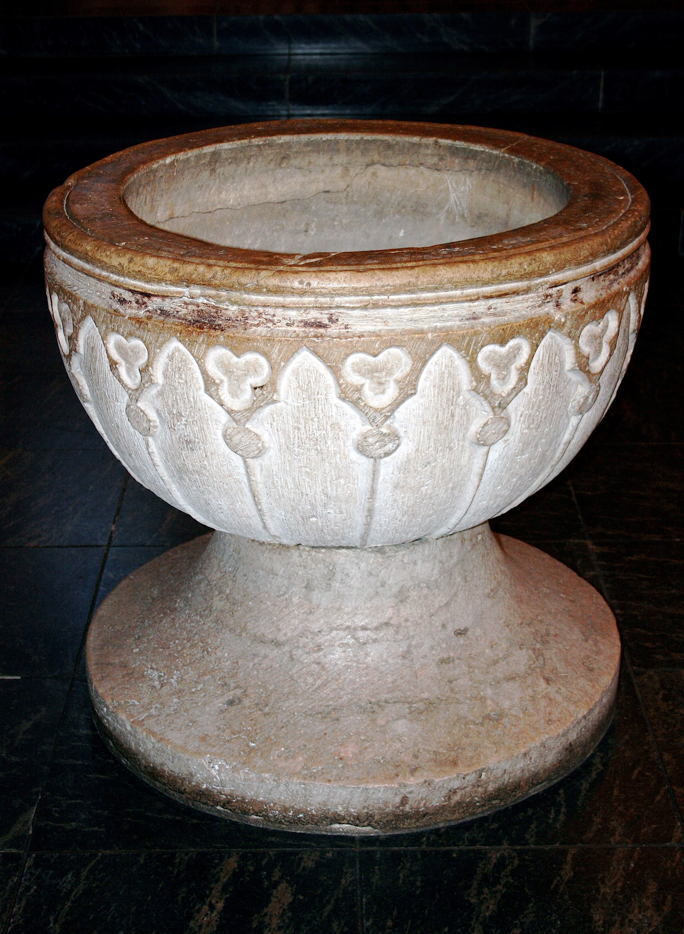 Rønne Kirke døbefont